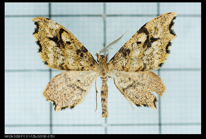 Lobogonia aculeata Wileman 尖尾四帶尺蛾 鞍1:P.52,Pl.12-35